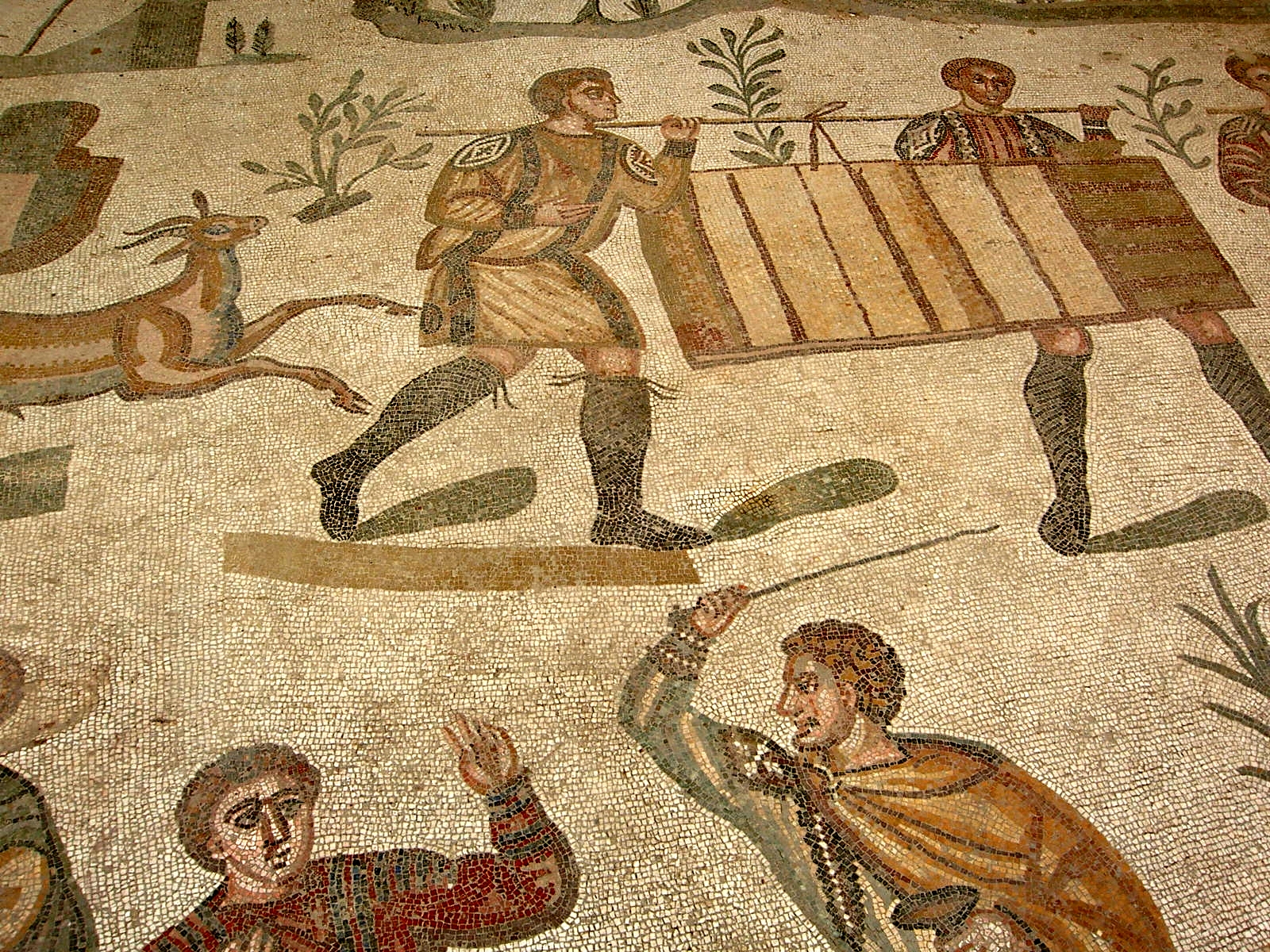 Hunting scene. Villa Romana del Casale, Piazza Armerina, Sicily, Italy